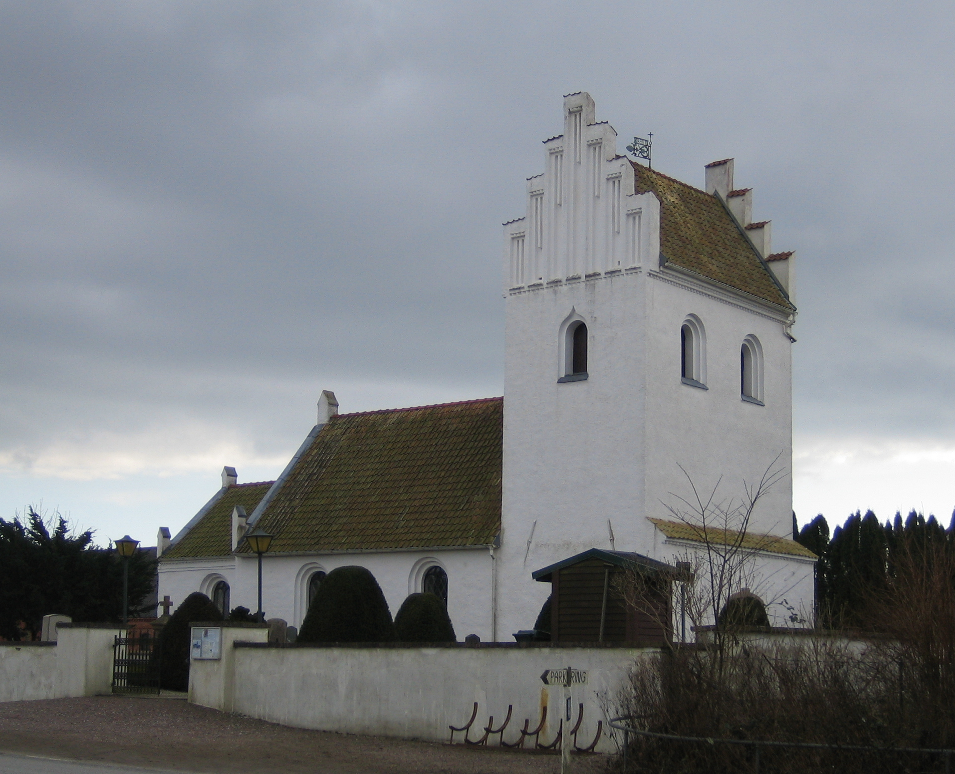 Västra Vemmerlövs kyrka, Skåne, Sweden